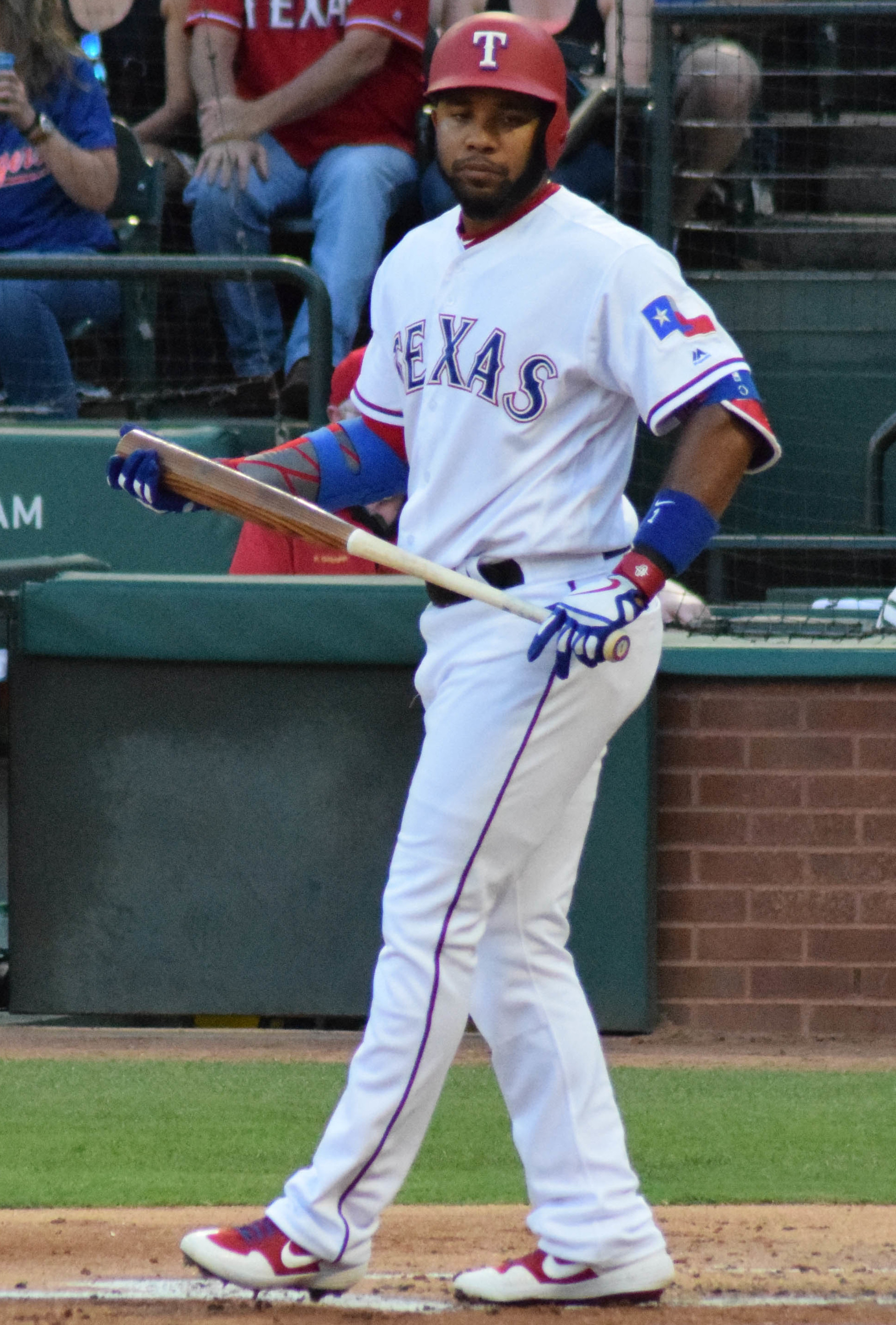 Elvis Andrus